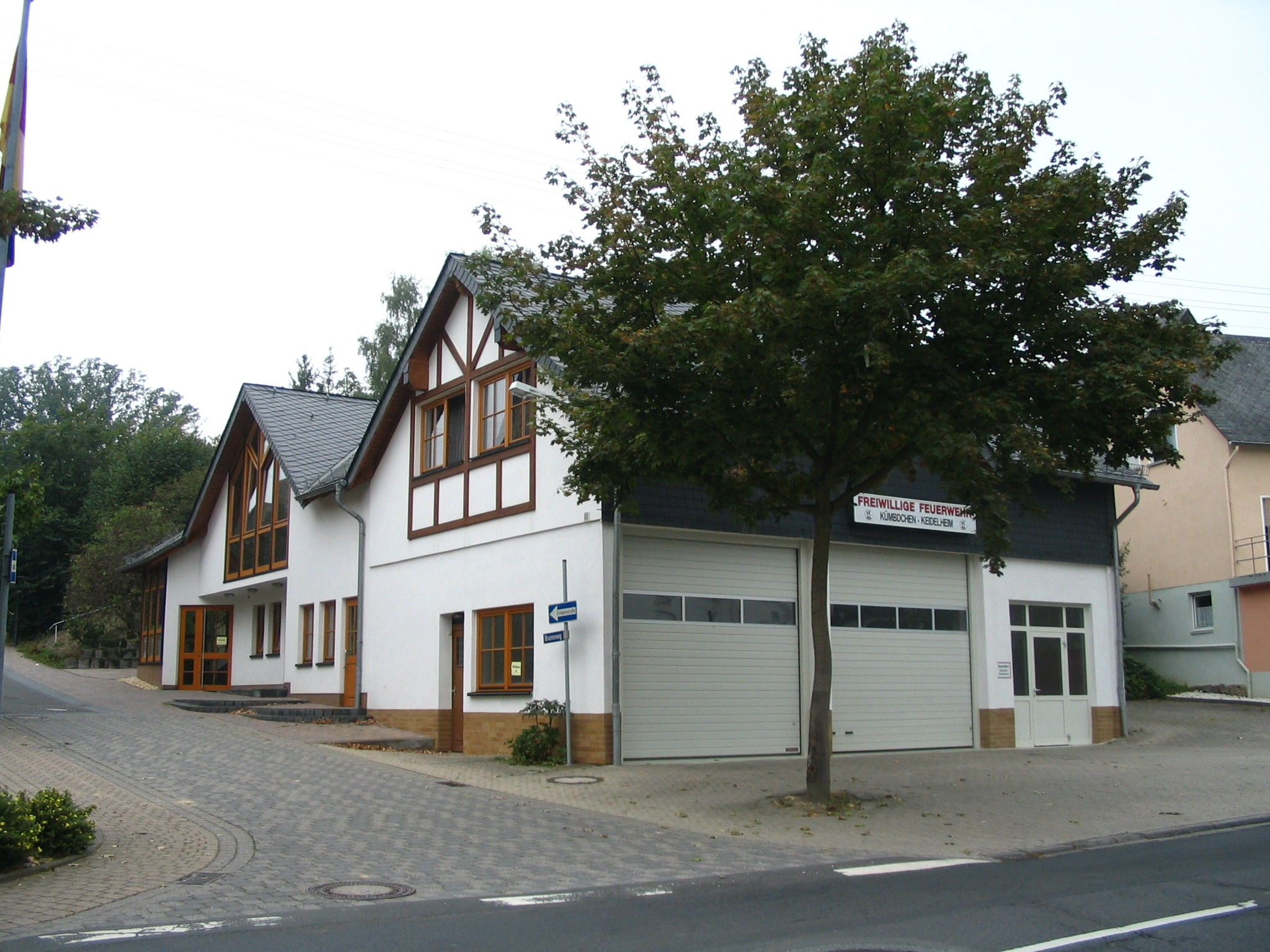 Mehrzweckhaus/Gemeinde- und Feuerwehrhaus in Keidelheim/Hunsrück